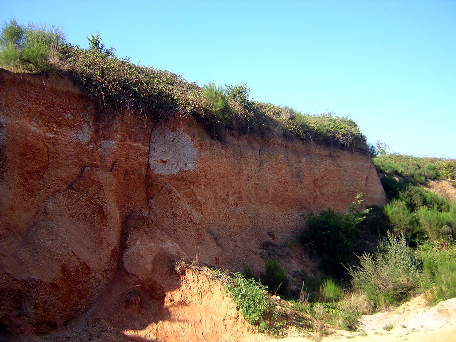 La carrière au lieu-dit de la Cormerais